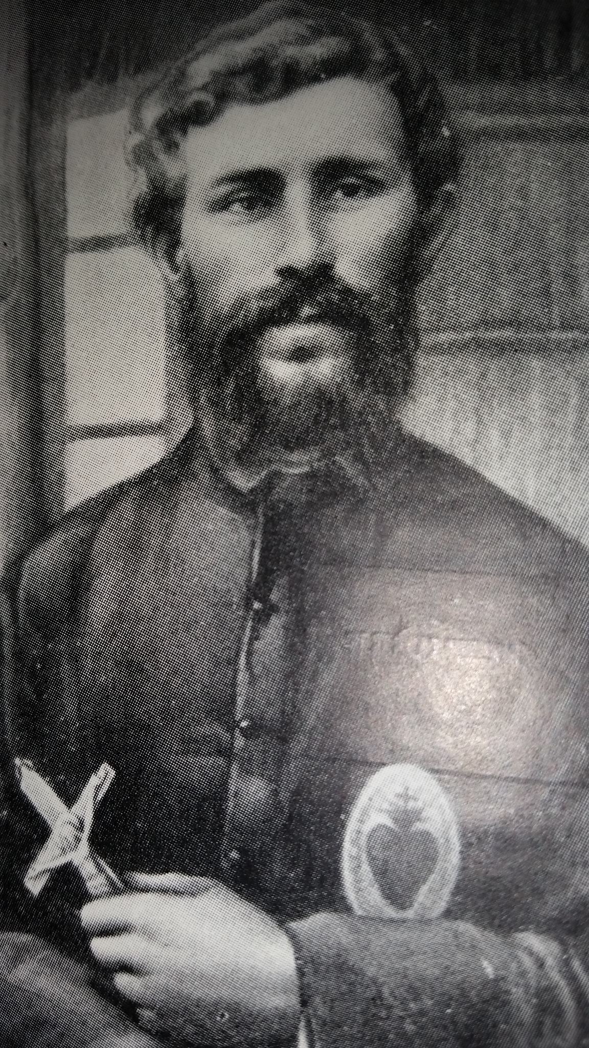 Photographie du XIXe siècle d'Henri Verjus extraite de l'ouvrage d'Arthur Temple Cadoux, L’apôtre des Papous, Mgr Henri Verjus, Missionnaire du Sacré-Cœur, Évêque de Limyre, 1931